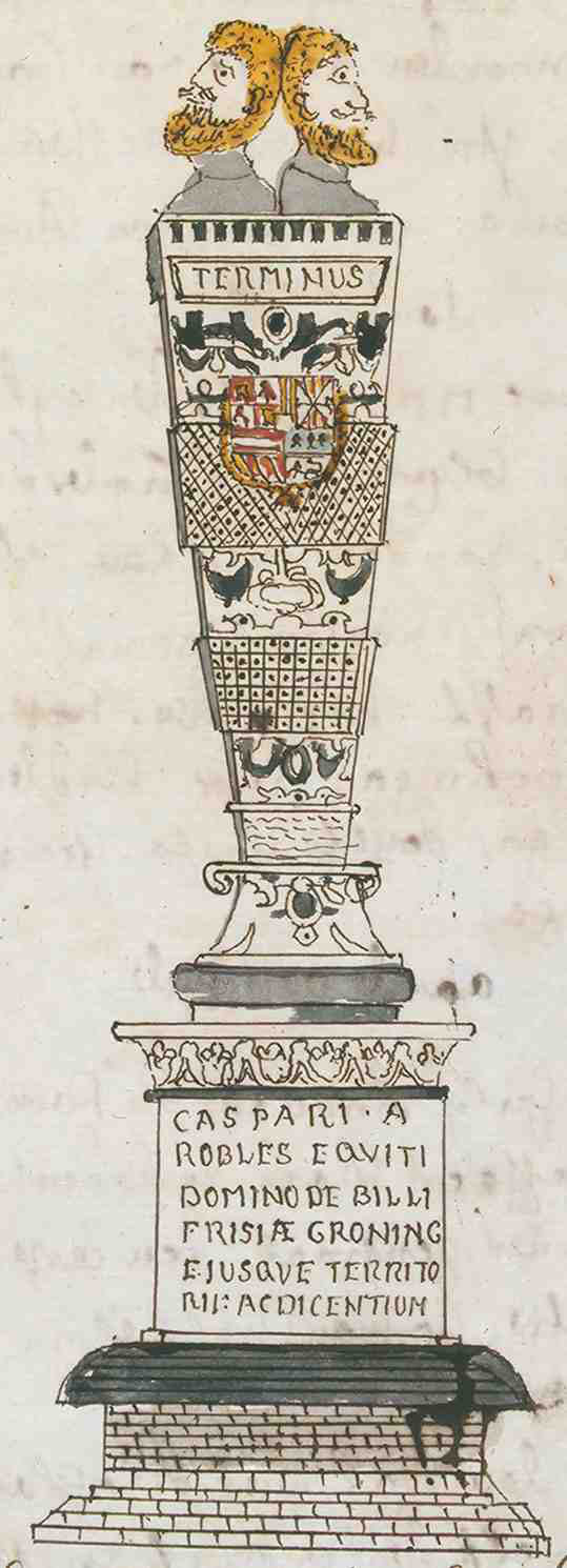 Korte Beschreijving van de Steden Dorpen Gehugten en Heeren-huizen der Heerlykheid Vriesland Benevens Desselfs Afbeeldingen Meest na 't leven getekent By een Vergaderdt Door Andries Schoemaker